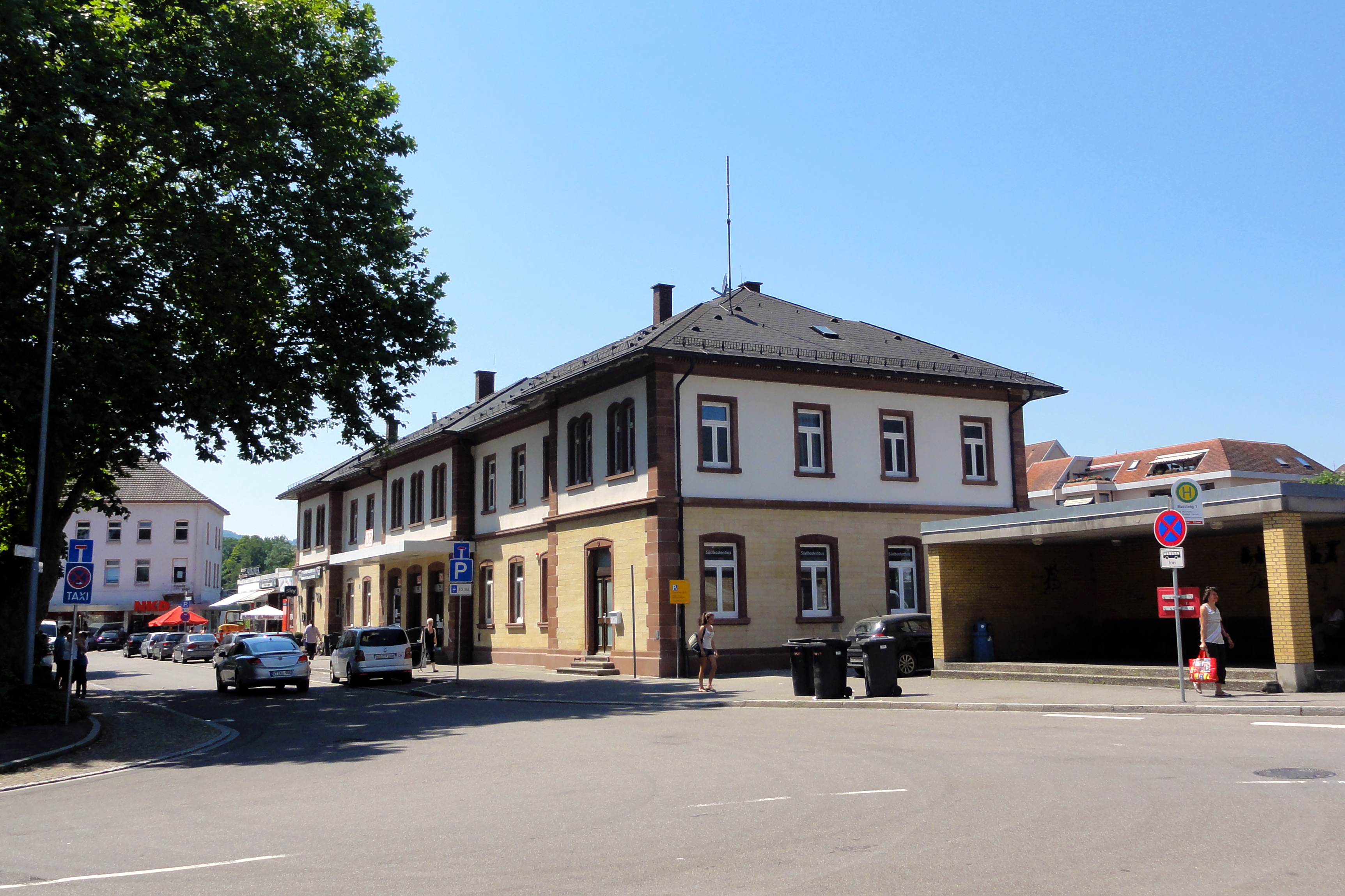 Germany